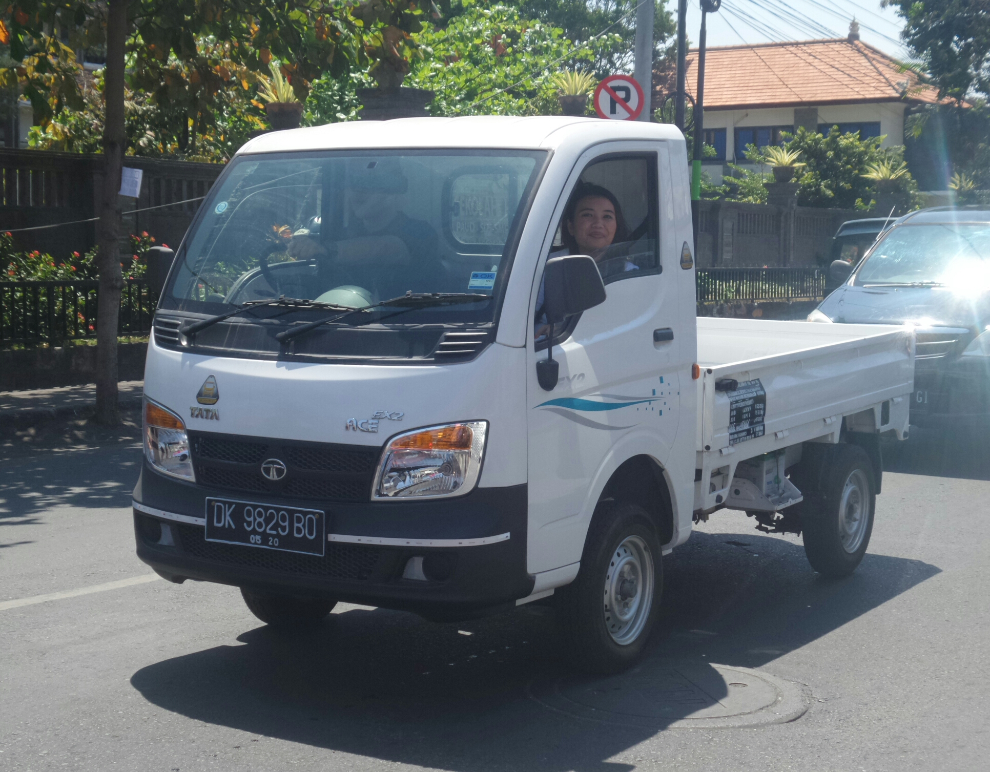 The 2100th photo from BxHxTxCx on Flickr. The Tata Ace EX2, aka the lower-spec Tata Ace (the highest is Super Ace). The sticker seems celebrating the pickup truck's 1 millionth units sold. Globally, mostly in India and surrounding areas. But here in Indonesia, the Ace began showing up around our street. Tata Ace EX2 atau dikenal dengan Tata Ace spek rendah (Super Ace tergolong top-of-the-range). Stiker yang terpasang adalah tanda perayaan 1 juta unit Tata Ace yang sudah terjual secara global, mayoritas di India dan sekitarnya. Di Indonesia, Ace mulai semakin sering menampakkan diri di jalanan.